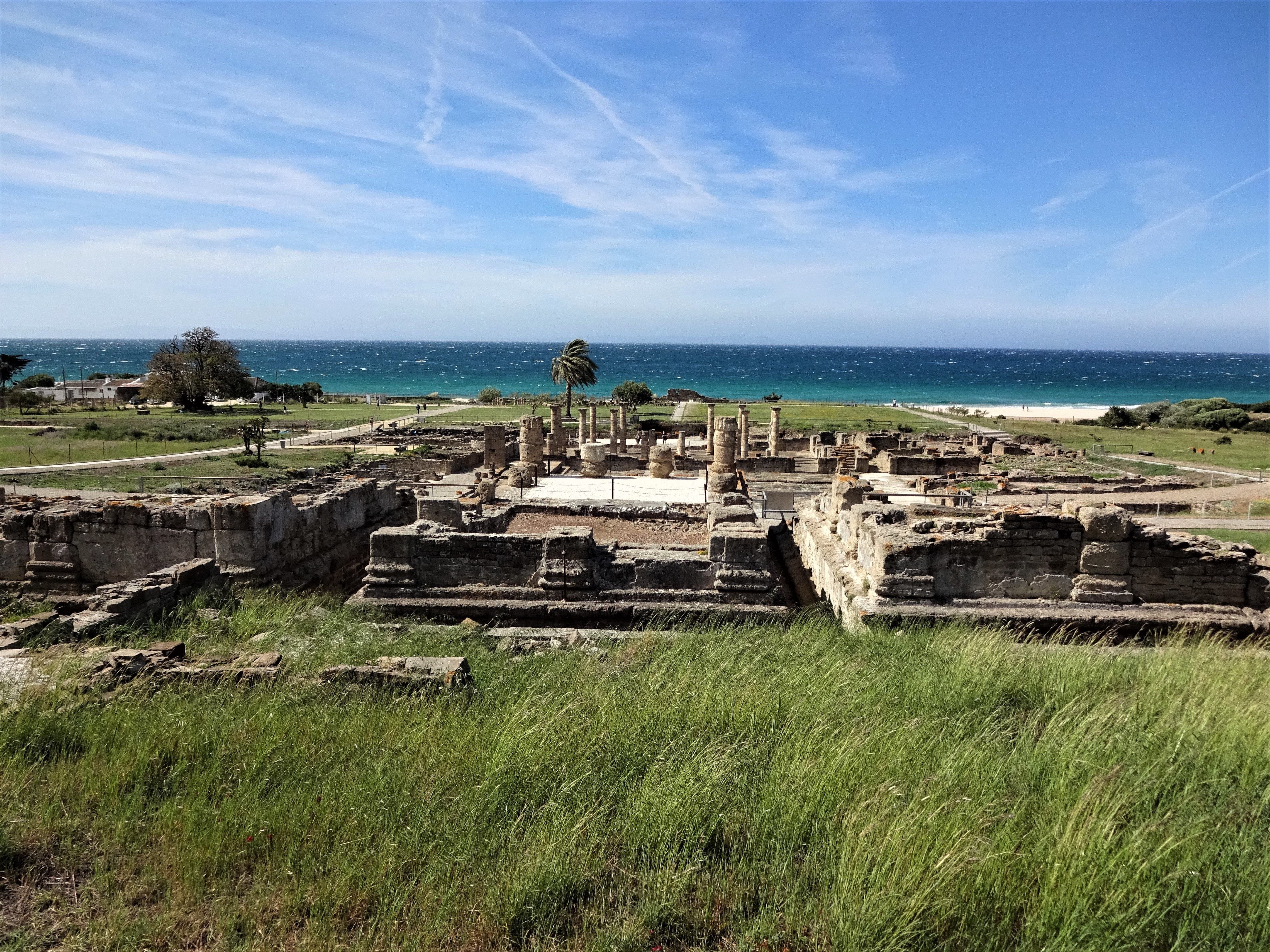 die drei Kapitoltempel in Baelo Claudia